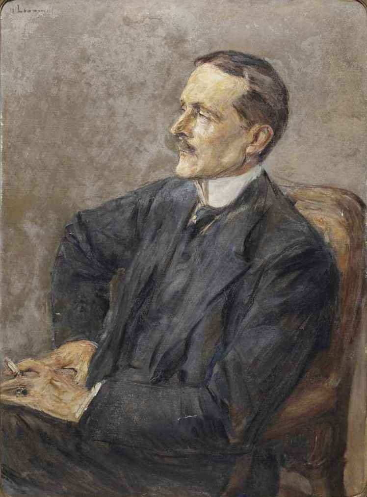 Ulrich Graf Brockdorff-Rantzau (* 29. Mai 1869 in Schleswig; † 8. September 1928 in Berlin) war ein deutscher Diplomat und von 1918/1919 deutscher Außenminister.